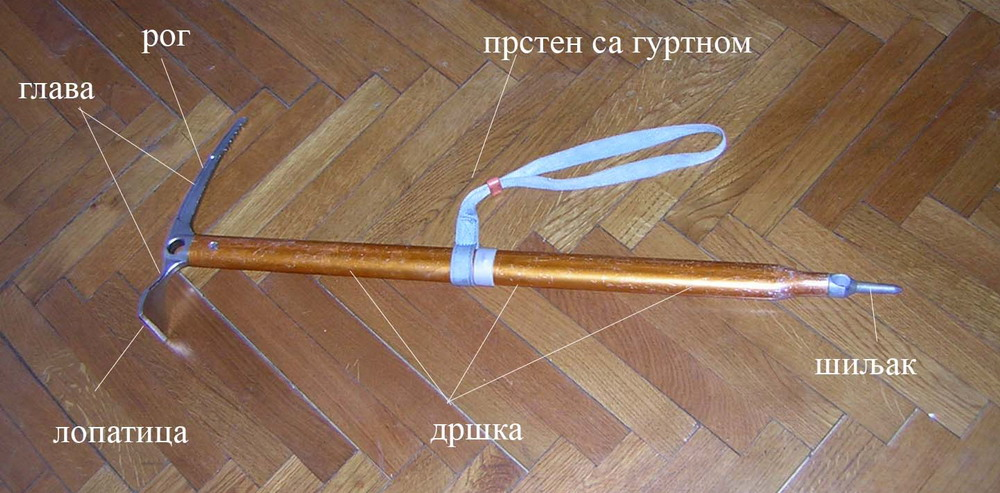 делови цепина